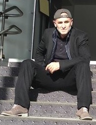 portrait d'Apti Bisultanov